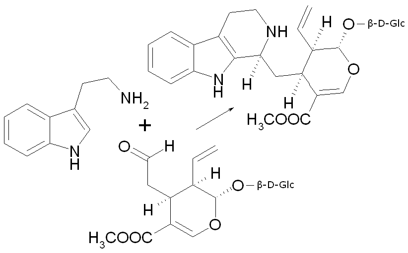 Reserpin-Biosynthese, Teil 1: Synthese des Ausgangsstoffes für Epiyohimban-Alkaloide Strictosidin